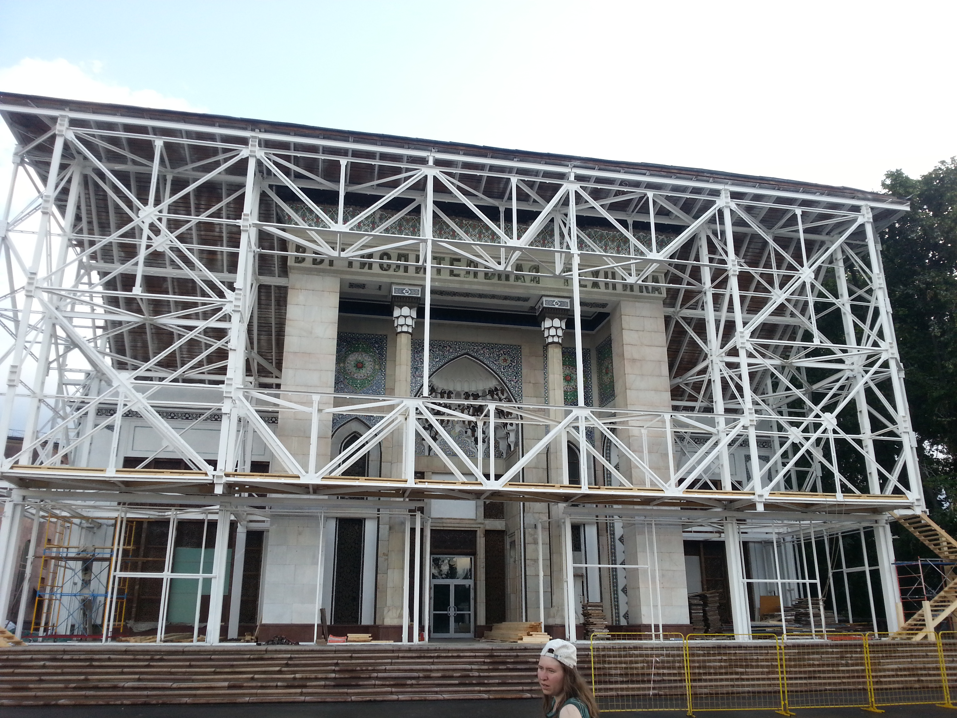 2 июля 2014, ВДНХ Павильон 14 в процессе возвращения первоначального вида